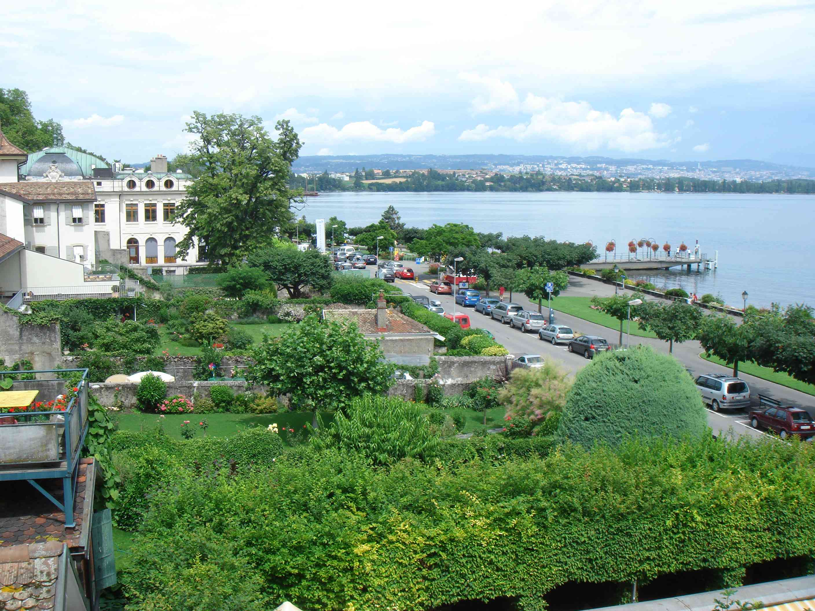 Uferpromenade von Morges